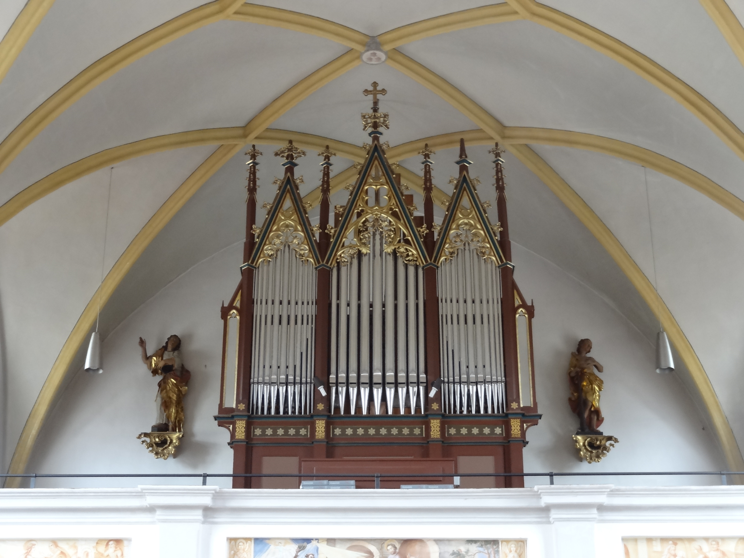 Orgel der Pfarrkirche St. Georg in Ast (Gde. Tiefenbach, Lkr. Landshut, Bayern)